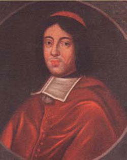 Беларуская (тарашкевіца): Юзэф Станіслаў Сапега